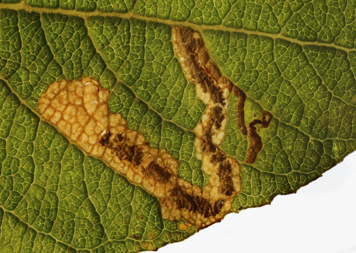 Stigmella salicis mine, Gronant dunes, North Wales, Sept 2015